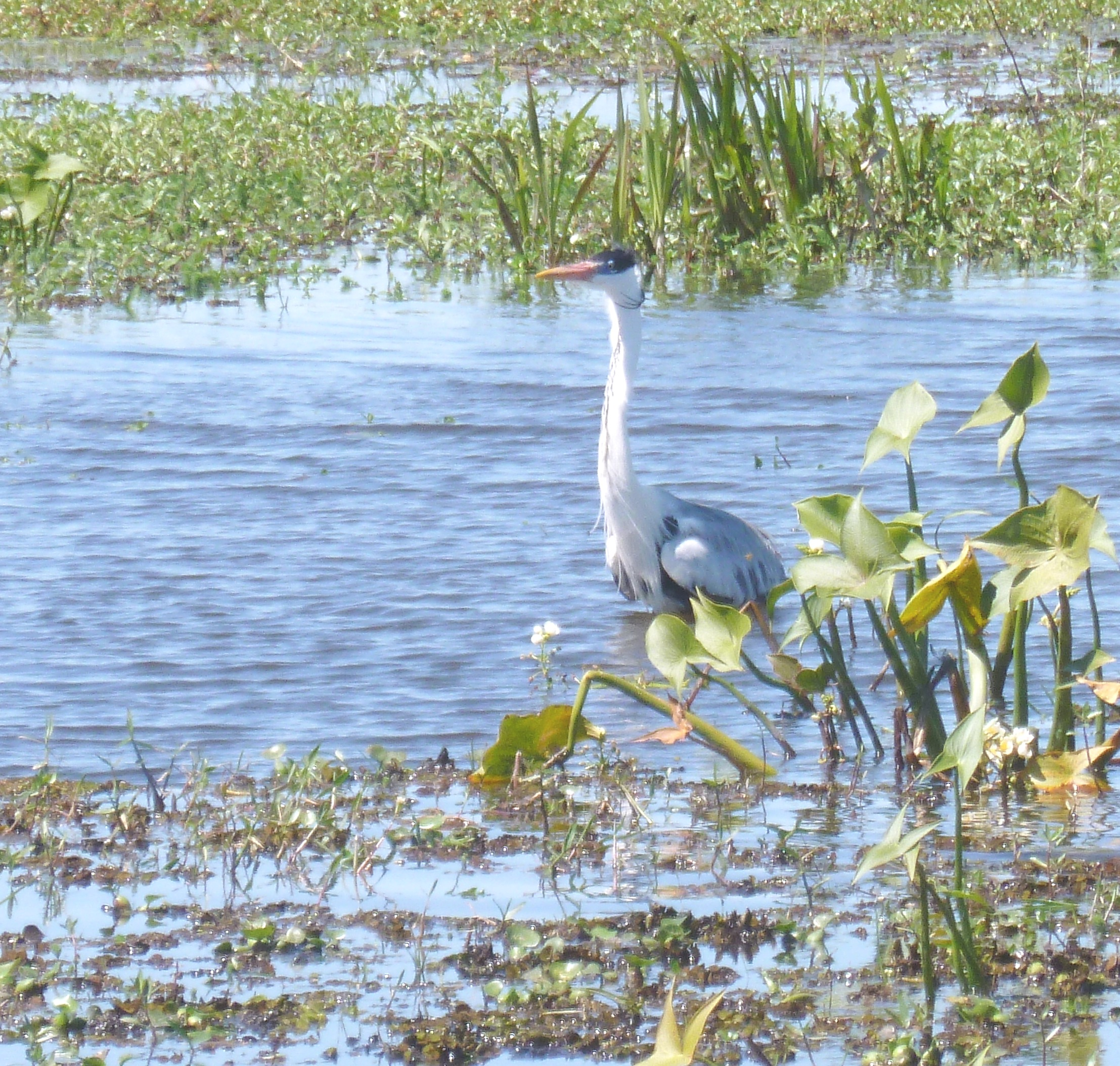 GARZA MORA 1 en los ESTEROS DEL IBERA ( el segundo mayor humedal del mundo,) provincia de Corrientes, Argentina.